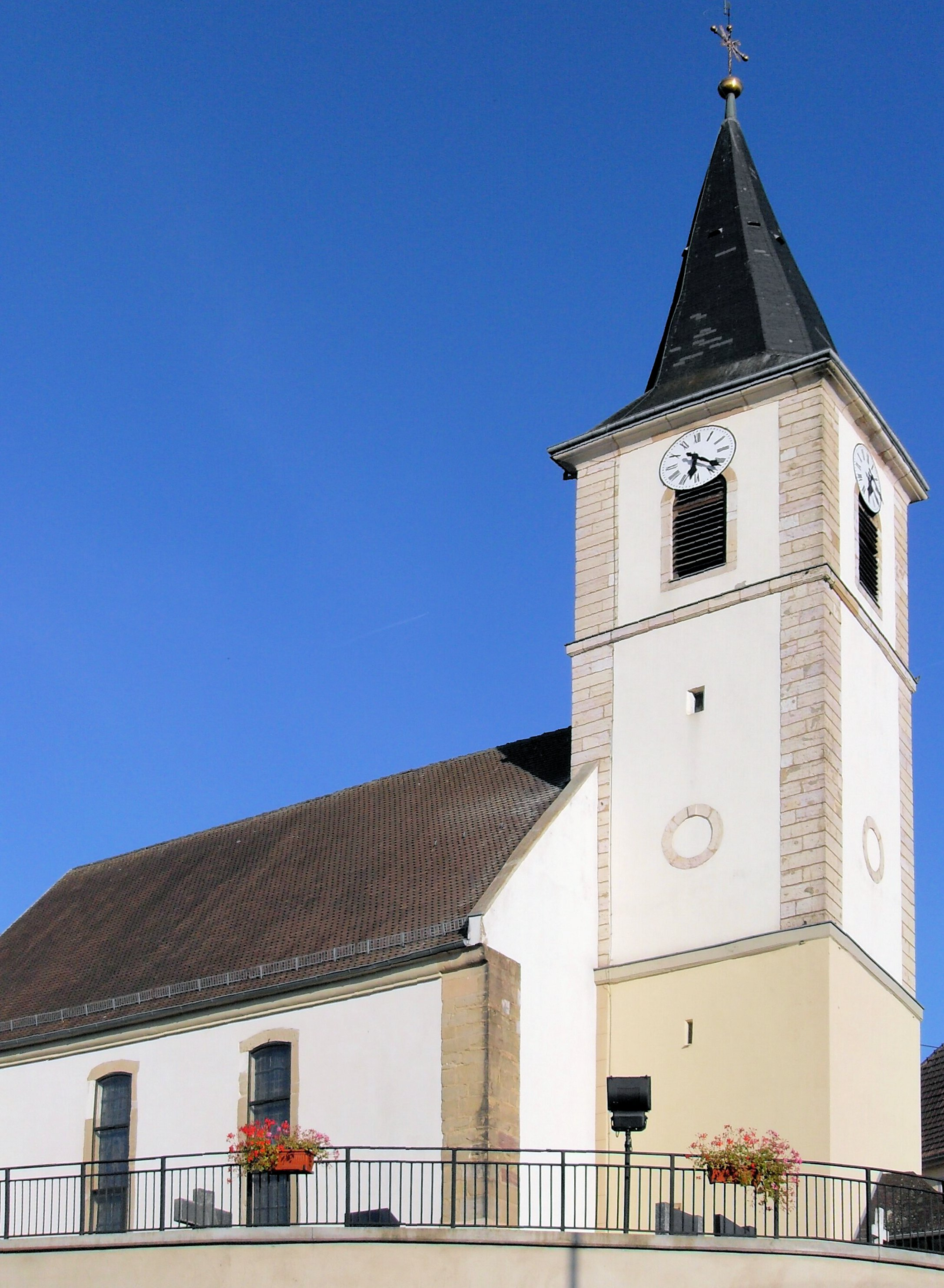 L'église Saint-Maurice à Wolschwiller